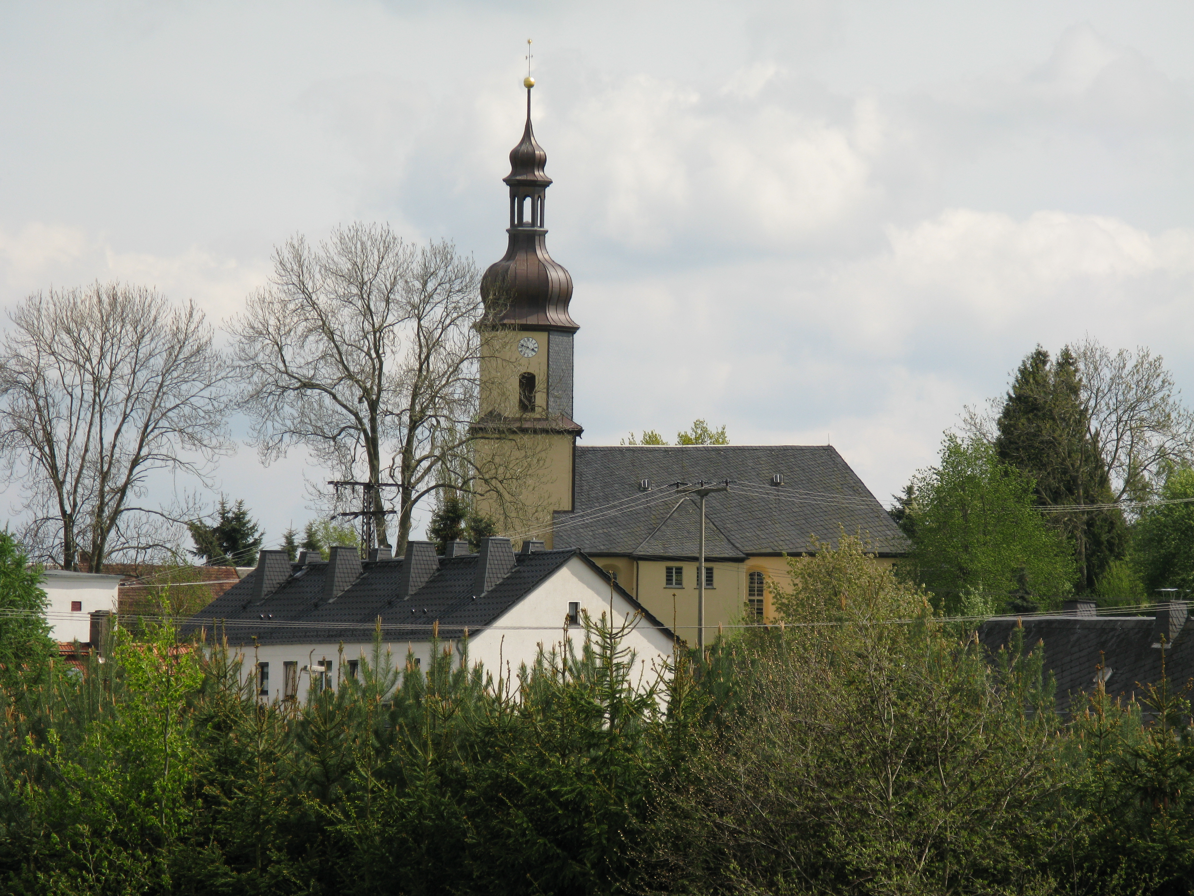 Kirche in Kemnitz (Ortsteil von Weischlitz)